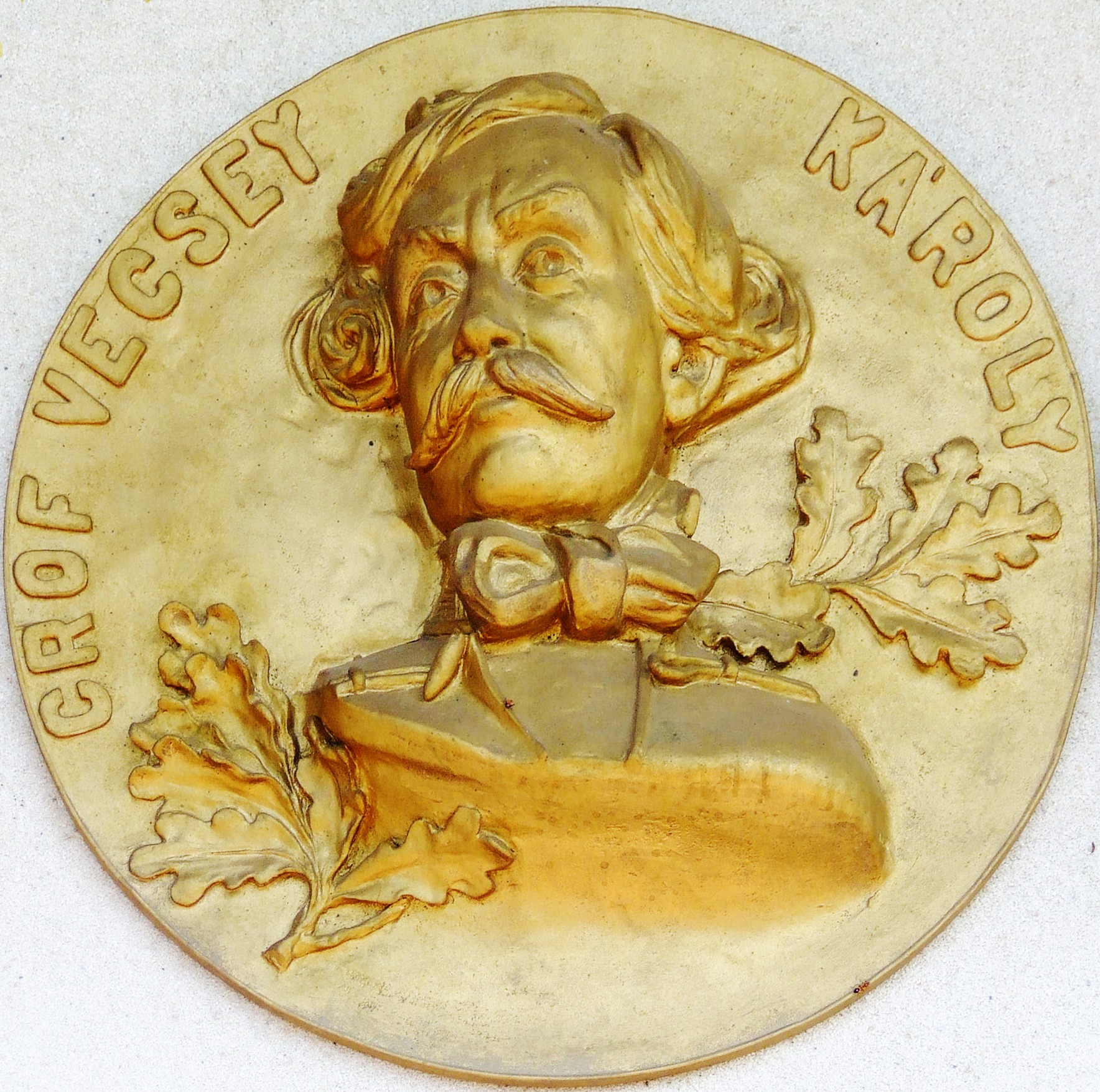 Vécsey Károly honvéd vezérőrnagy, aradi vértanú. Portrédombormű a keceli Haditechnikai Parkban